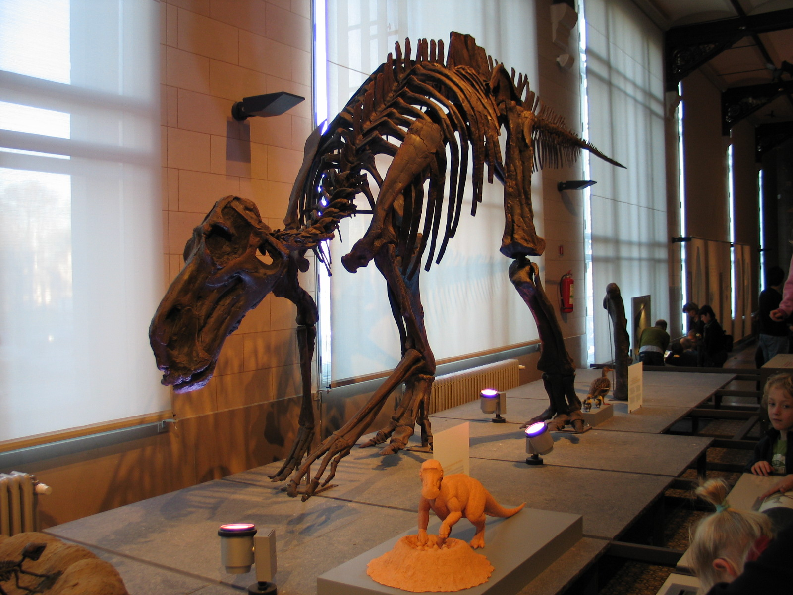 Maiasaura at the Museum voor Natuurwetenschappen in Brussels, Belgium